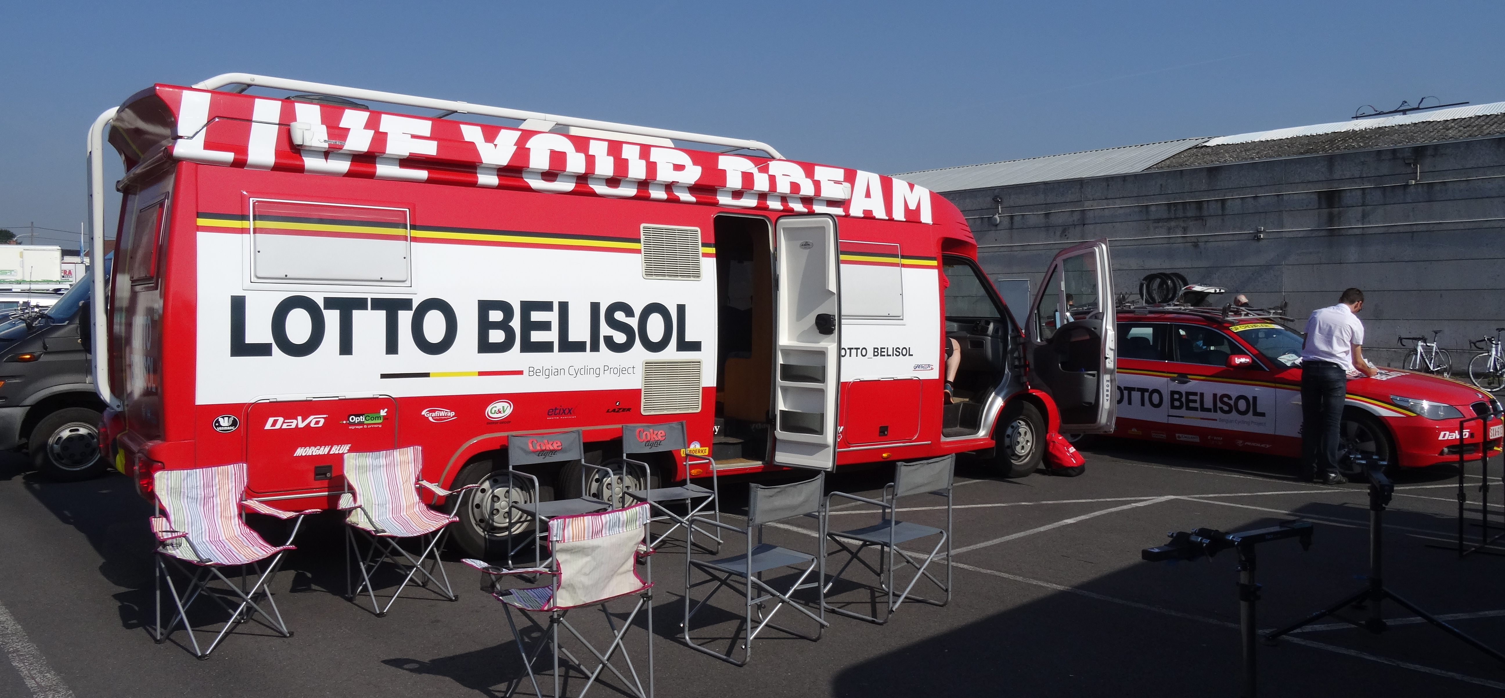 Reportage réalisé le samedi 17 mai à l'occasion du départ du Grand Prix Criquielion 2014 à Boussu, Belgique.